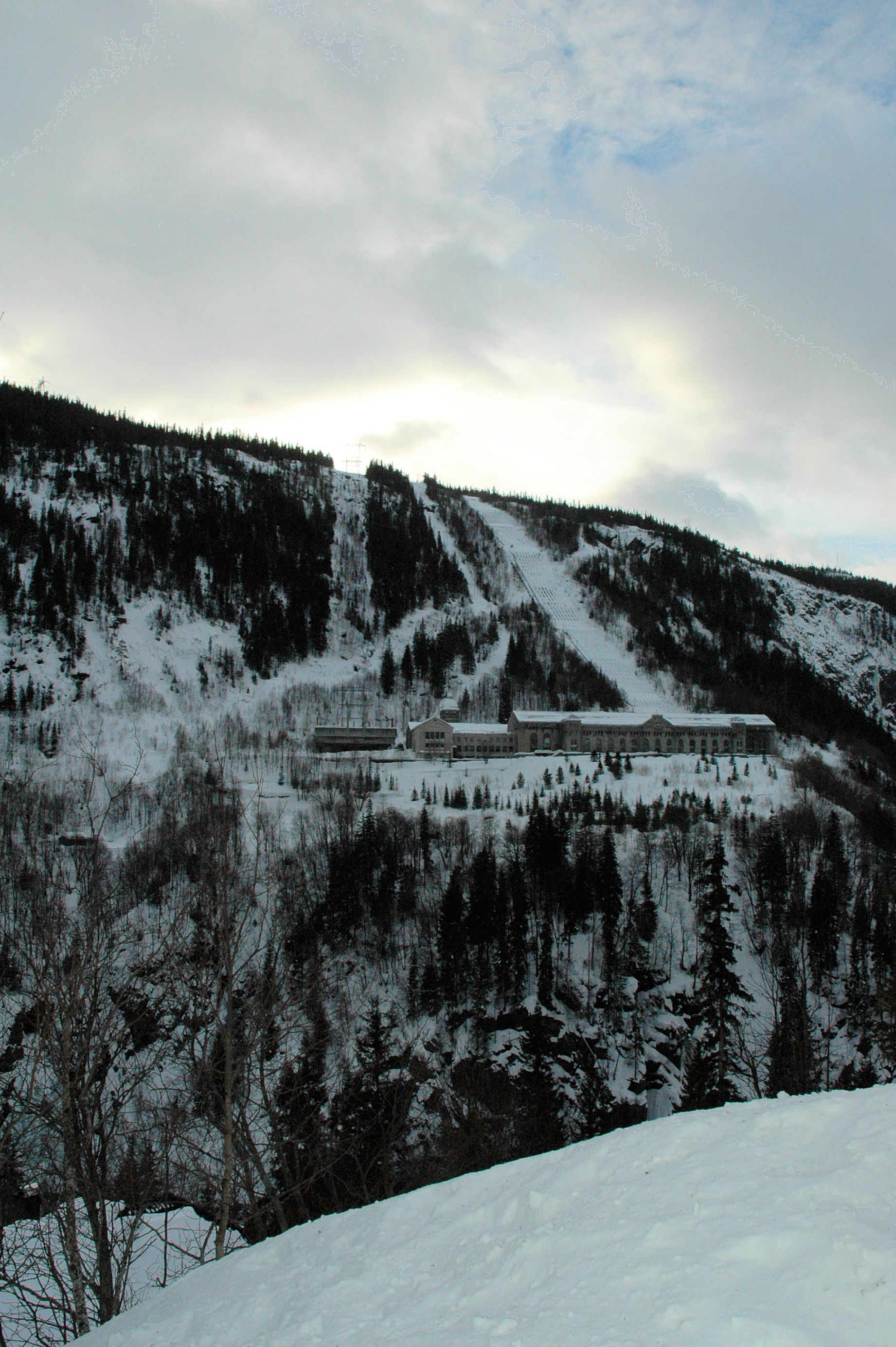 Vemork